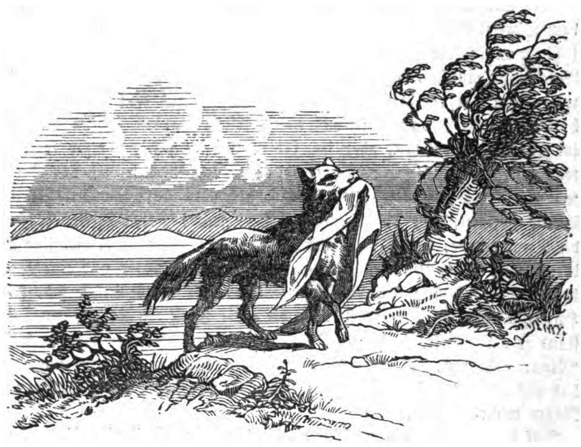 Berthold Auerbach, Schwarzwälder Dorfgeschichten, Des Schloßbauers Vefele, Zeichnung von Mathias Artaria, 1848. – „Nicht weit von Hirschau sprang ihm das Mohrle entgegen, es trug ein rothes Halstuch im Maul.“